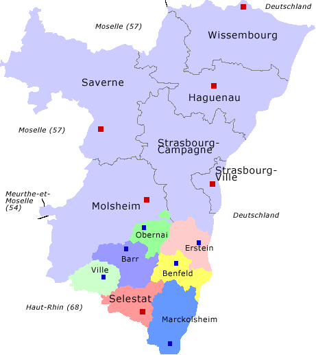 Karte des Arrondissements Sélestat-Erstein mit Verwaltungsgliederung und Lage im Département Bas-Rhin